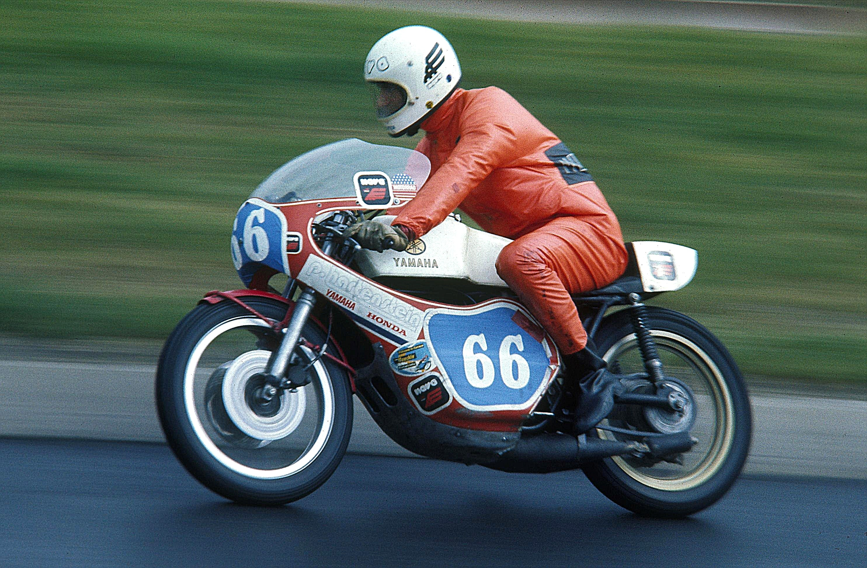 Helmut Dähne auf Yamaha TZ, 350 cm³ auf dem Nürburgring, Südkehre